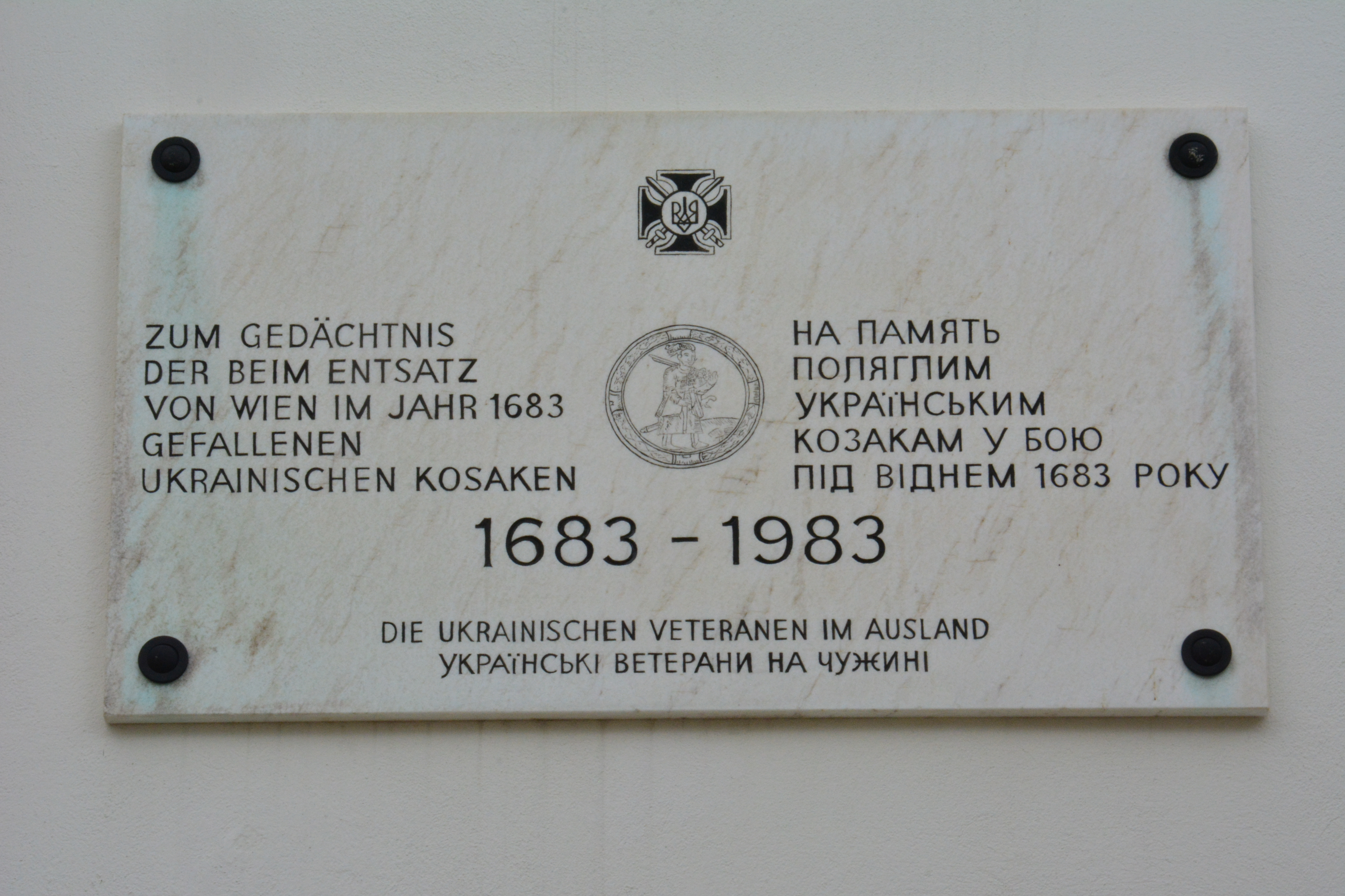 Gedenktafel für ukrainische Kosaken 1683 (Wien, Am Leopoldsberg, Burg)